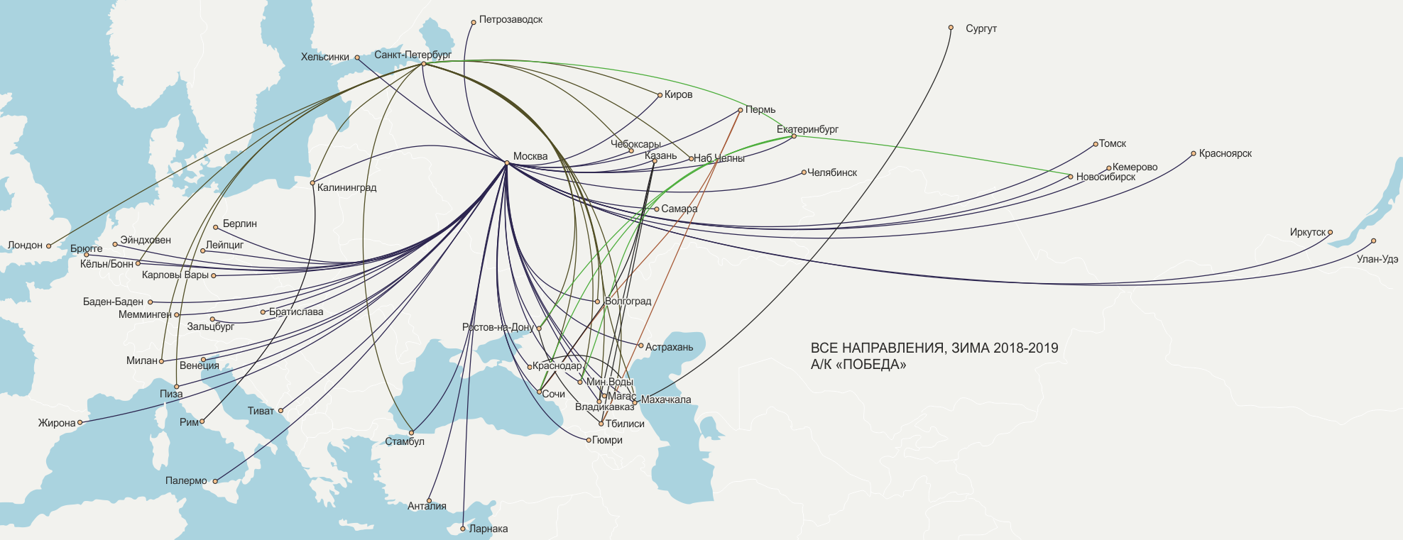 Все направления зима 2019